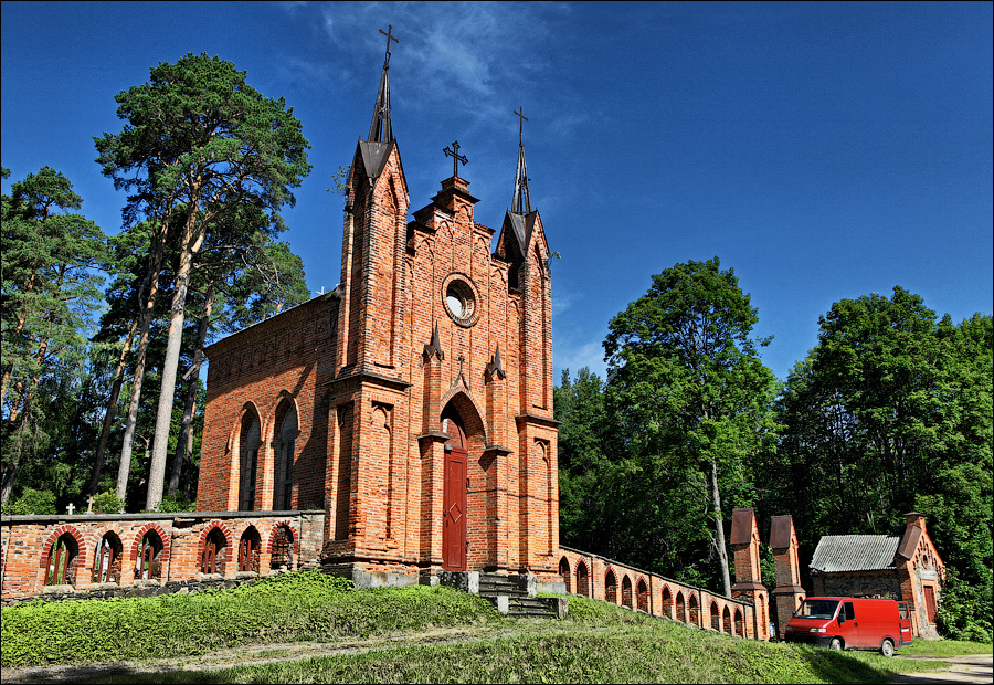 Ахрэмаўцы. Капліца